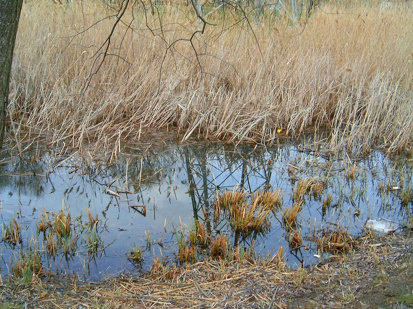 A Gőtés-tó környéke (Budapest, III. kerület, a békásmegyeri lakótelep mellett)